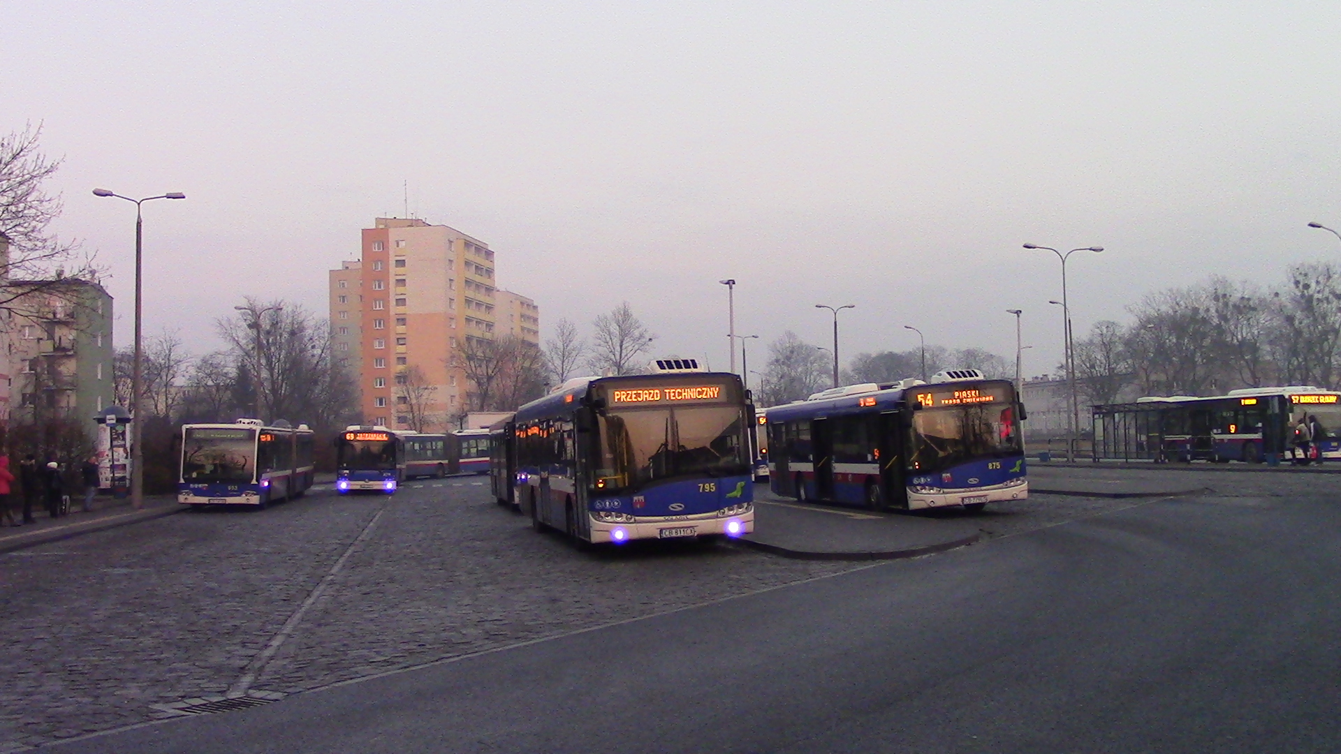 Pętla Błonie w Bydgoszczy